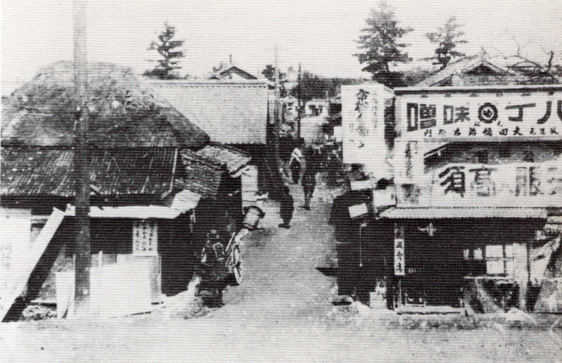 1926年（大正15年）の岡崎市。東岡崎駅より明代橋方面を望む。現在の岡崎市明大寺本町付近。